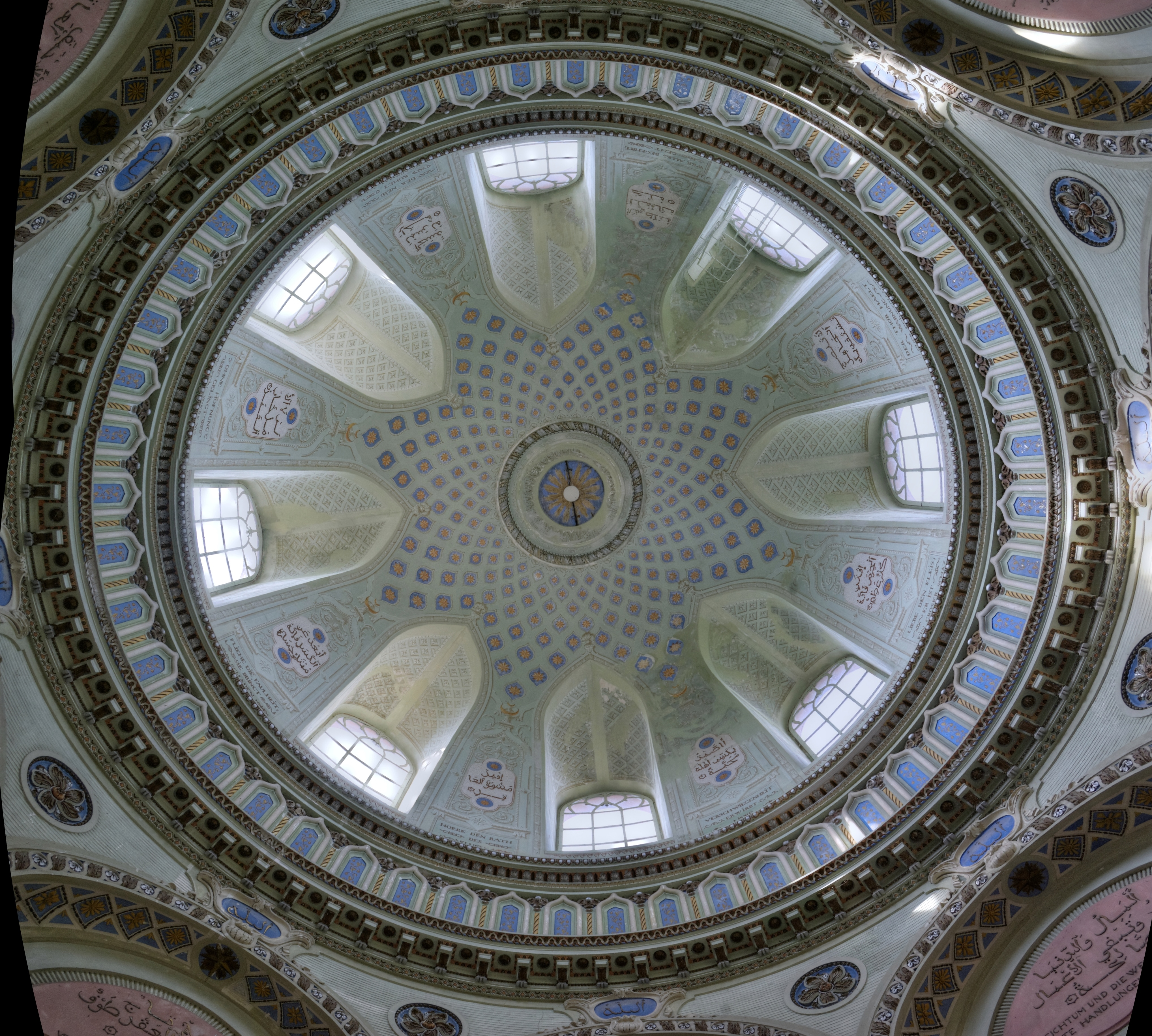 Schwetzingen, Moschee im Schloßgarten